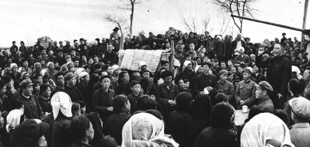 1966-07 1966年河北地震赈灾-曾山